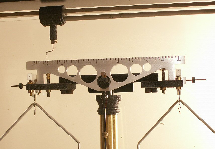 Balans (detail met oa ruitertje) Deze balans staat overigens in de ruststand, en kan dus niet vrij bewegen. In vrijstand zakt het donkere gedeelte dat de zilver- witte arm nu nog ondersteunt plm ½ cm. Eigen opname. Detailopname van nl::Afbeelding:balans.jpg